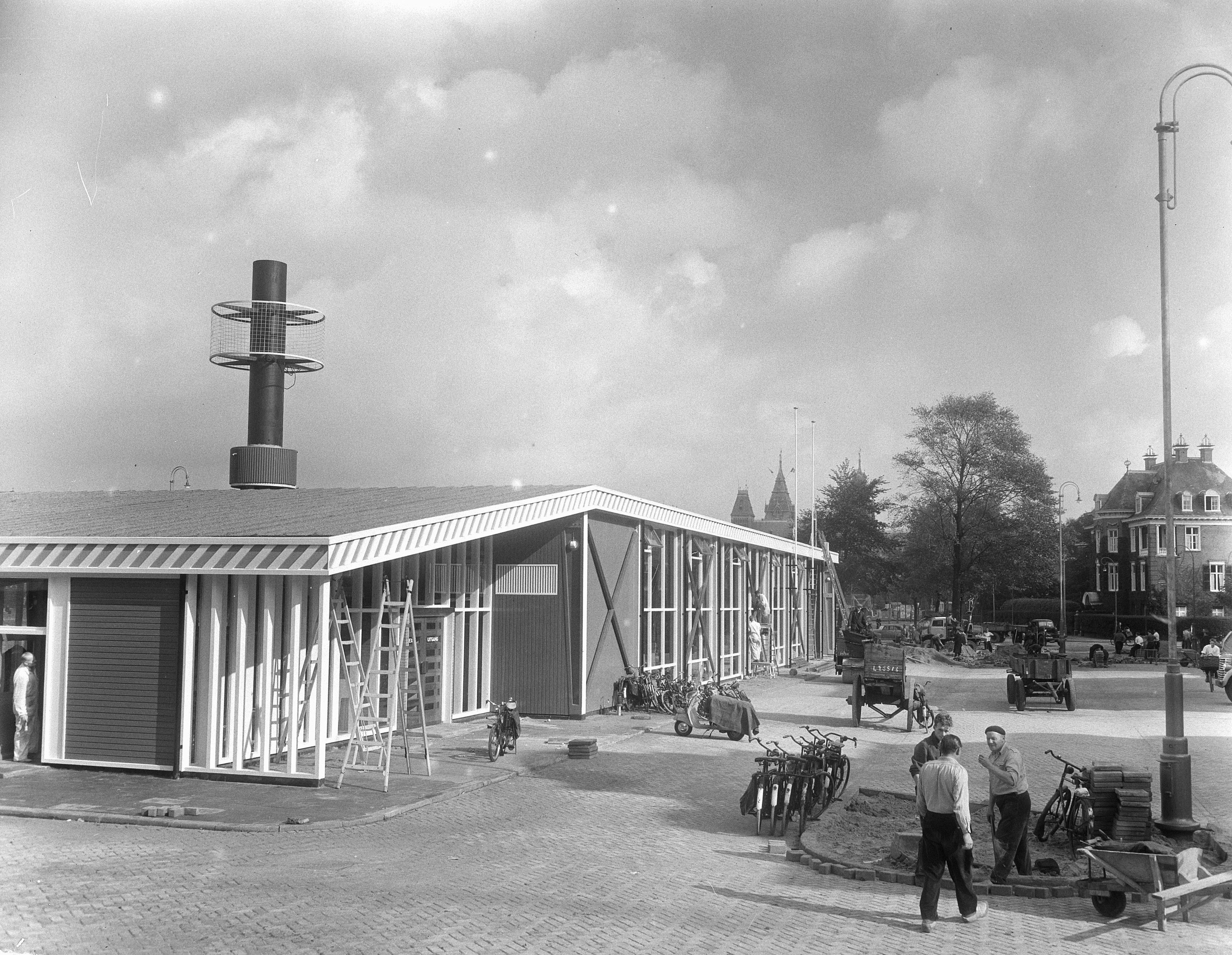 Collectie / Archief : Fotocollectie Anefo Reportage / Serie : [ onbekend ] Beschrijving : Nieuw KLM-busstation op Museumplein in afbouw Datum : 25 september 1953 Instellingsnaam : KLM Fotograaf : Pot, Harry / Anefo Auteursrechthebbende : Nationaal Archief Materiaalsoort : Glasnegatief Nummer archiefinventaris : bekijk toegang 2.24.01.09 Bestanddeelnummer : 905-9879